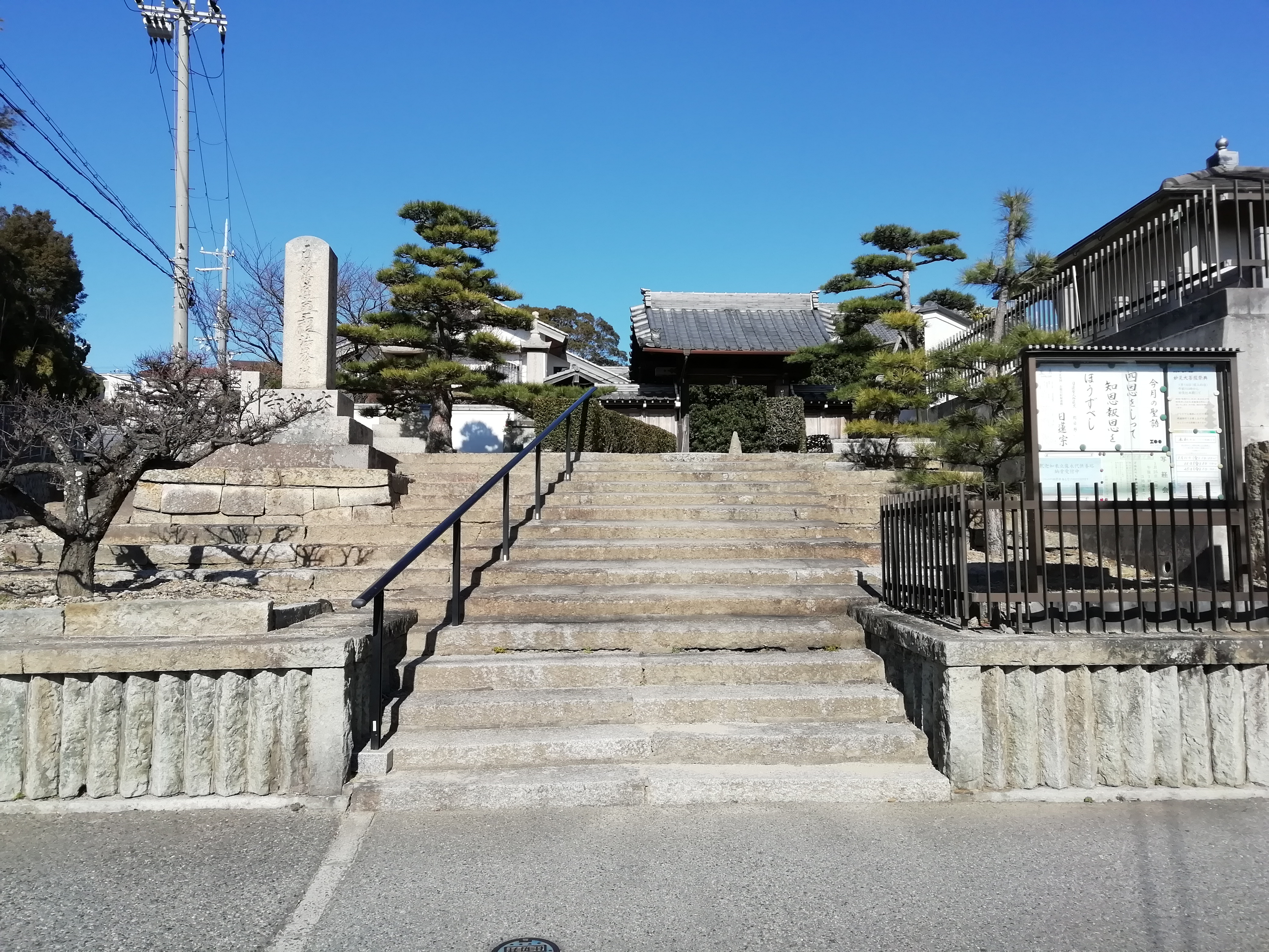 本松寺 (明石市)